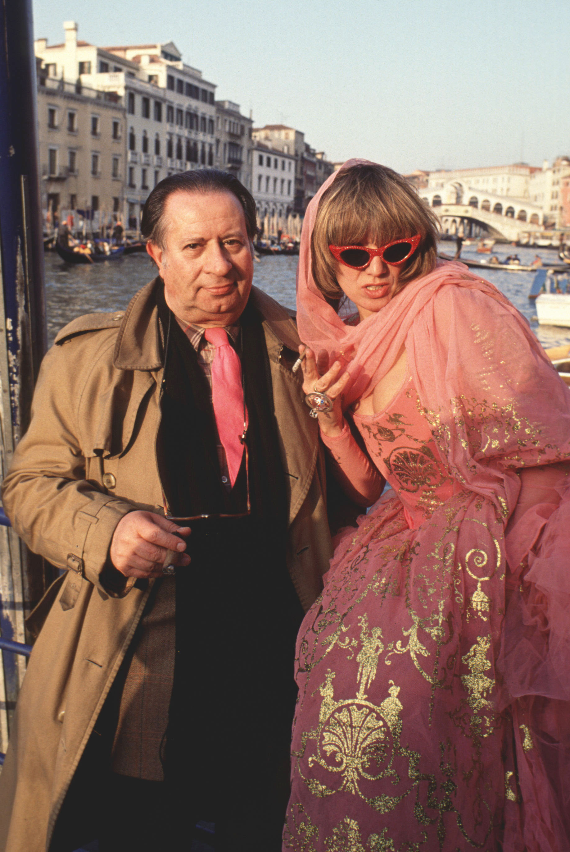 Il regista Tinto Brass con la stilista Fiorella Mancini, a Venezia